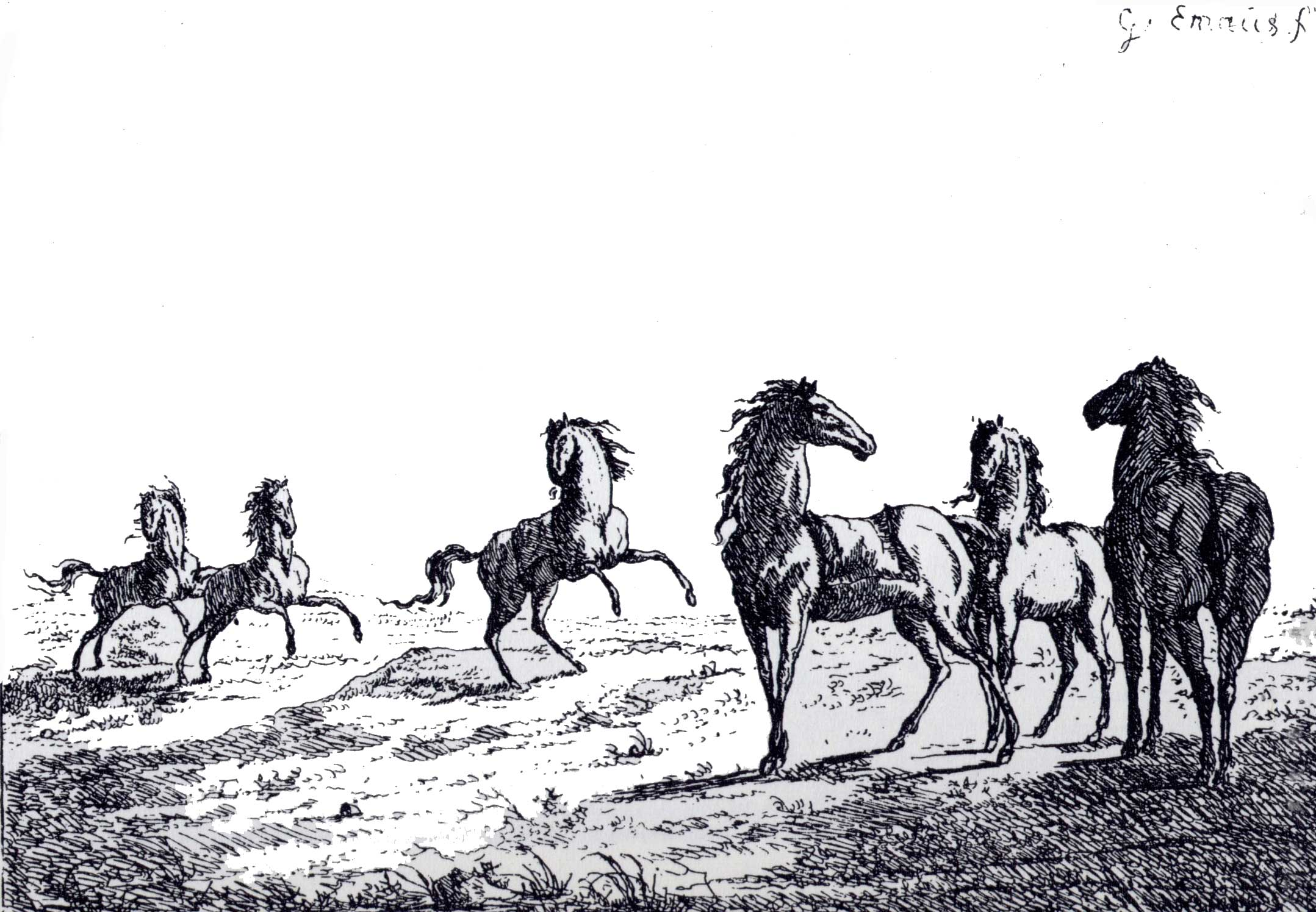 Paardenstudie (tekening)